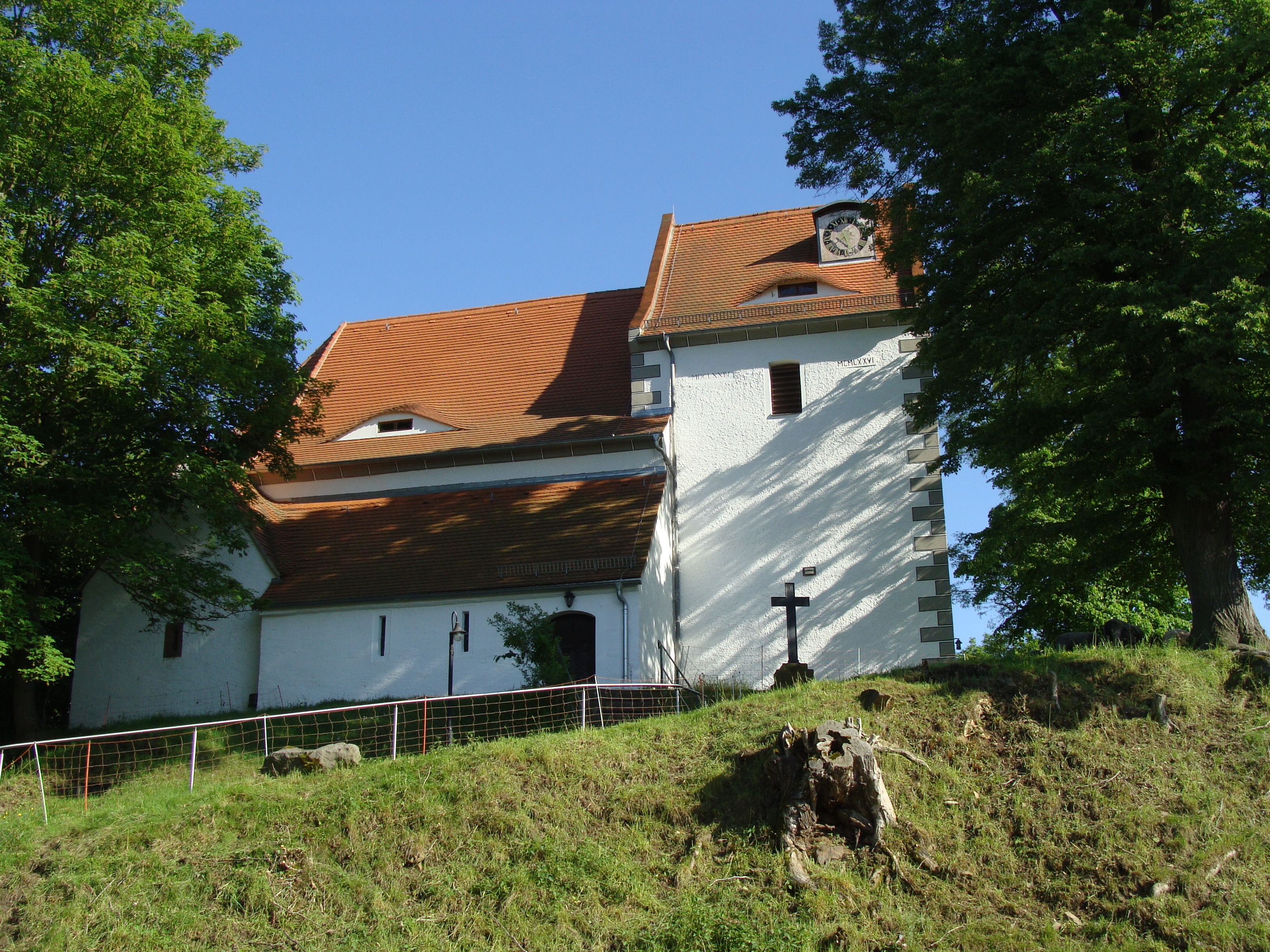 Wehrkirche Höfgen bei Grimma